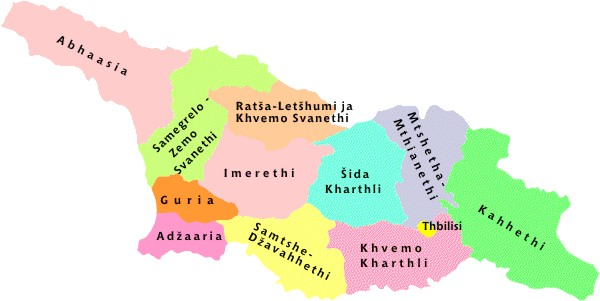 Gruusia esimese järgu haldusükused